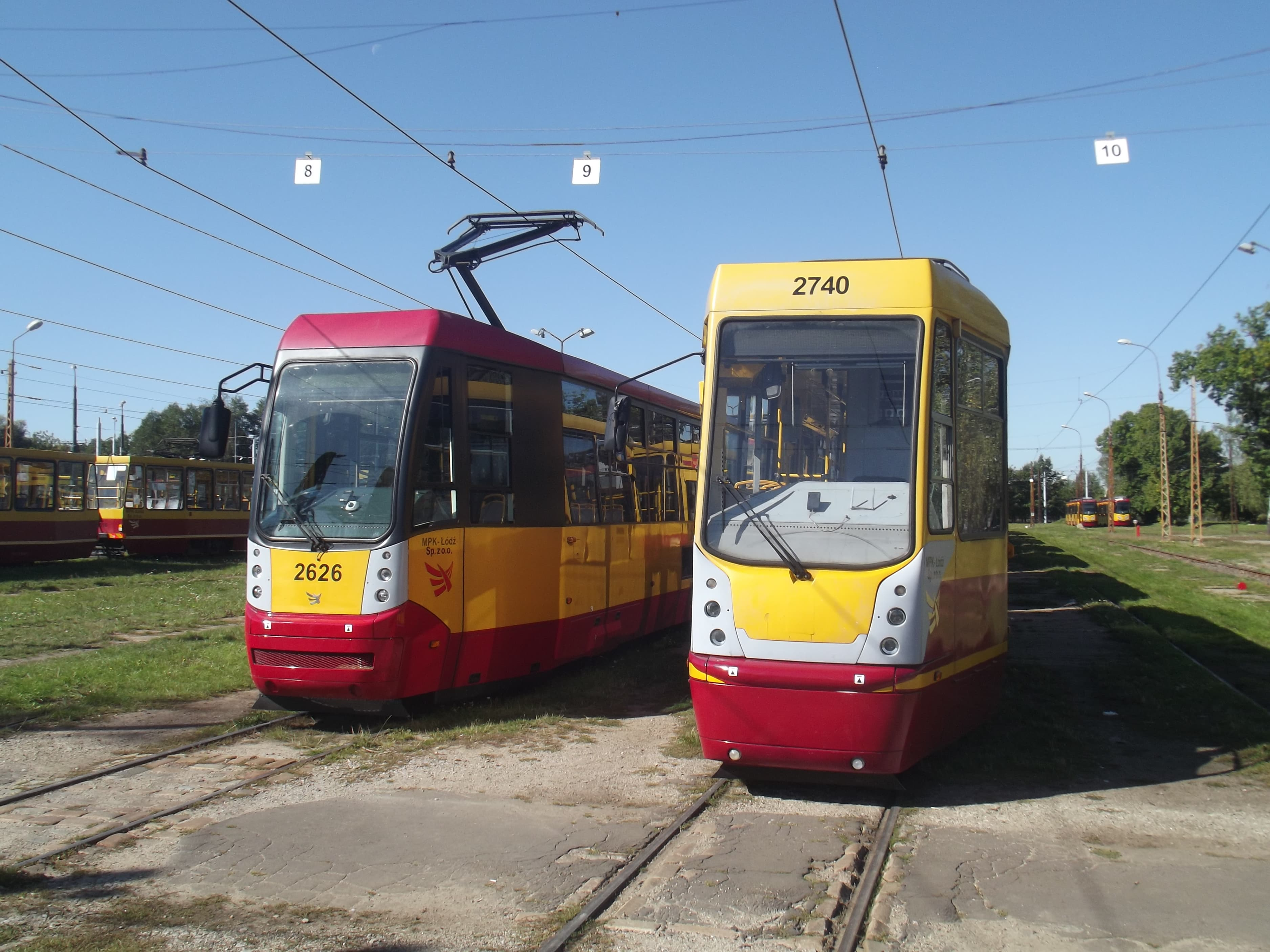 postój tramwajów w zajezdni